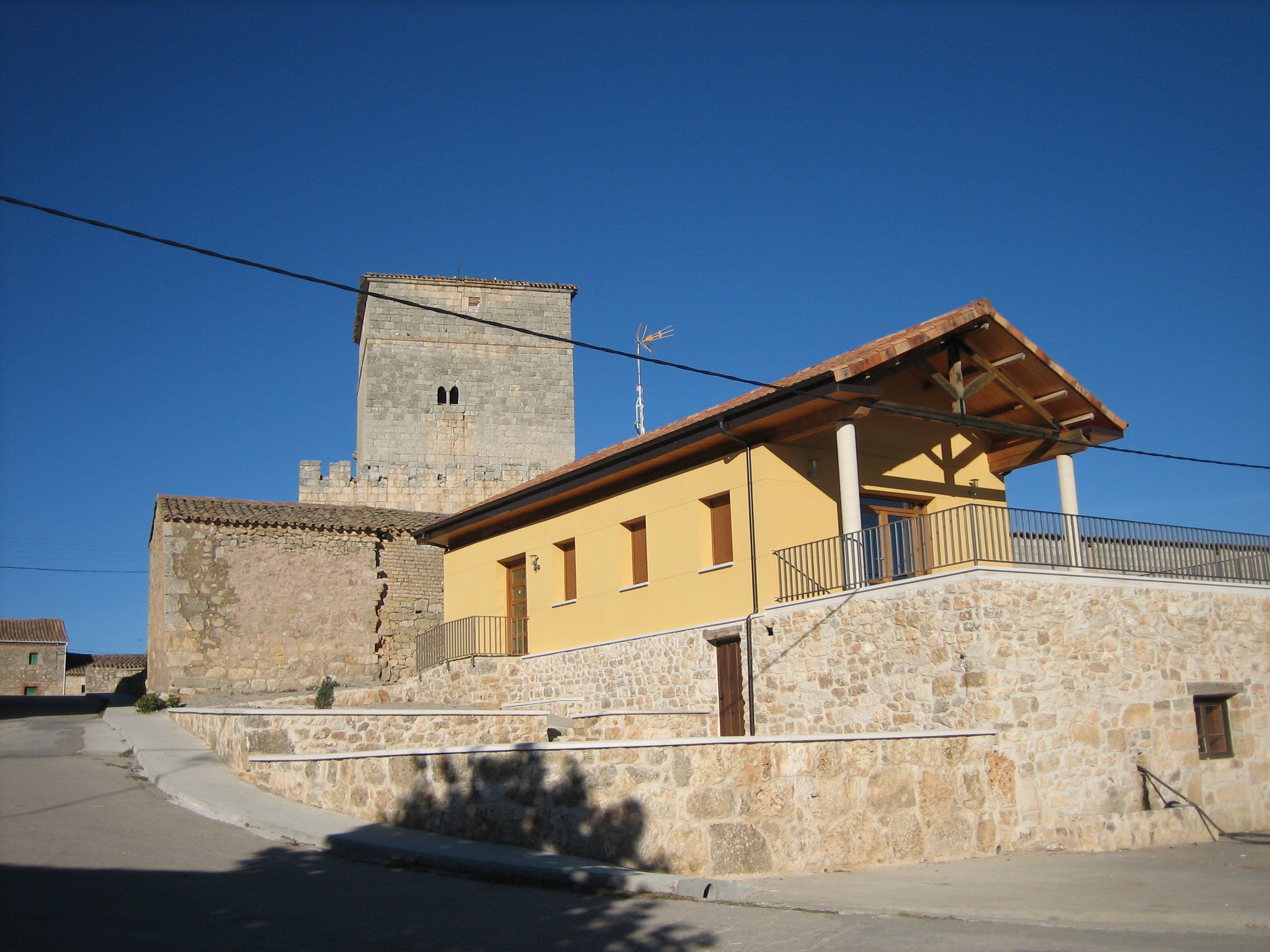 vista panorámica del centro de usos múltiples y Torreon